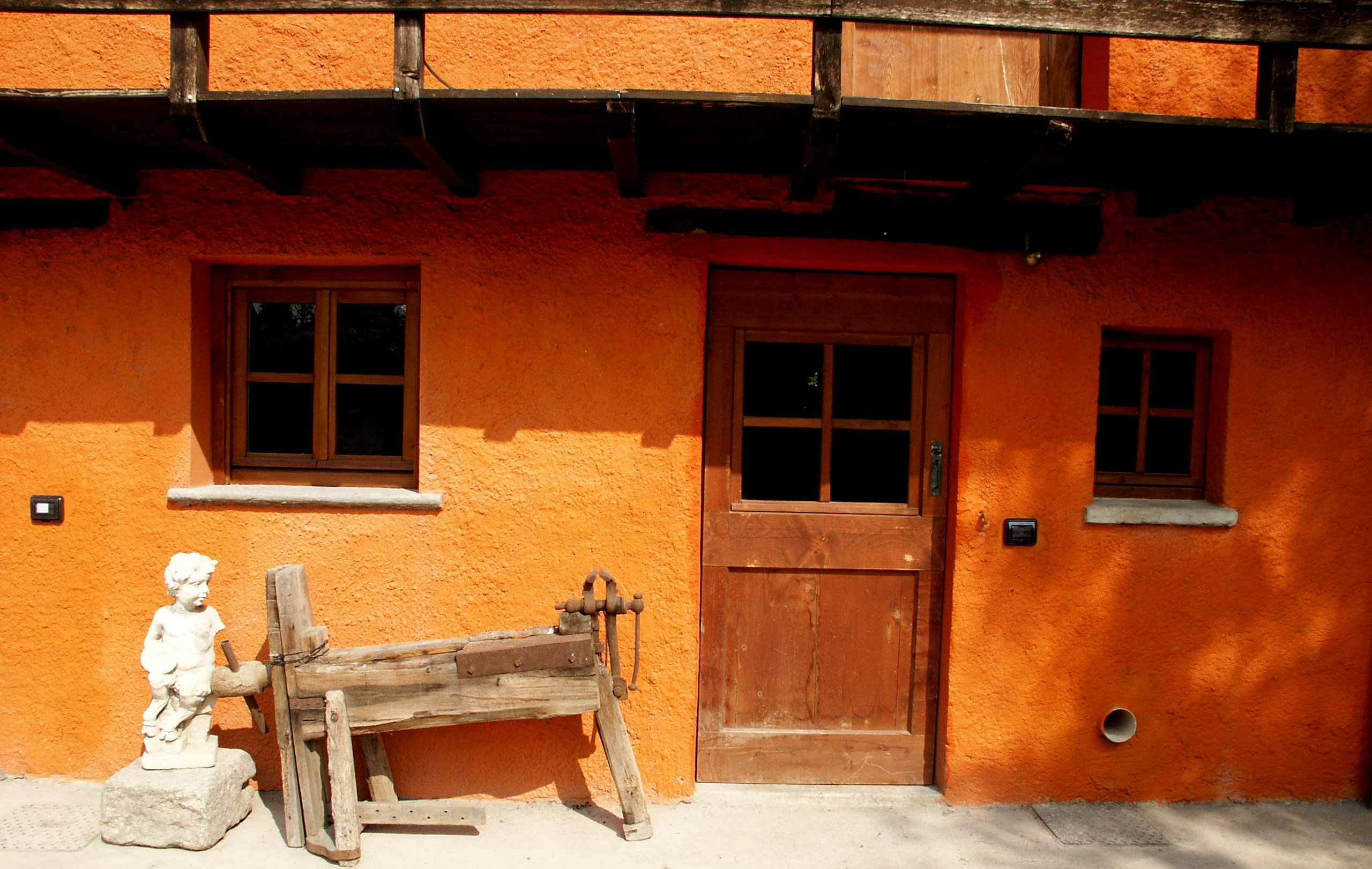 Cascina Lodovica a Oreno di Vimercate. Source: Photo by Frieda